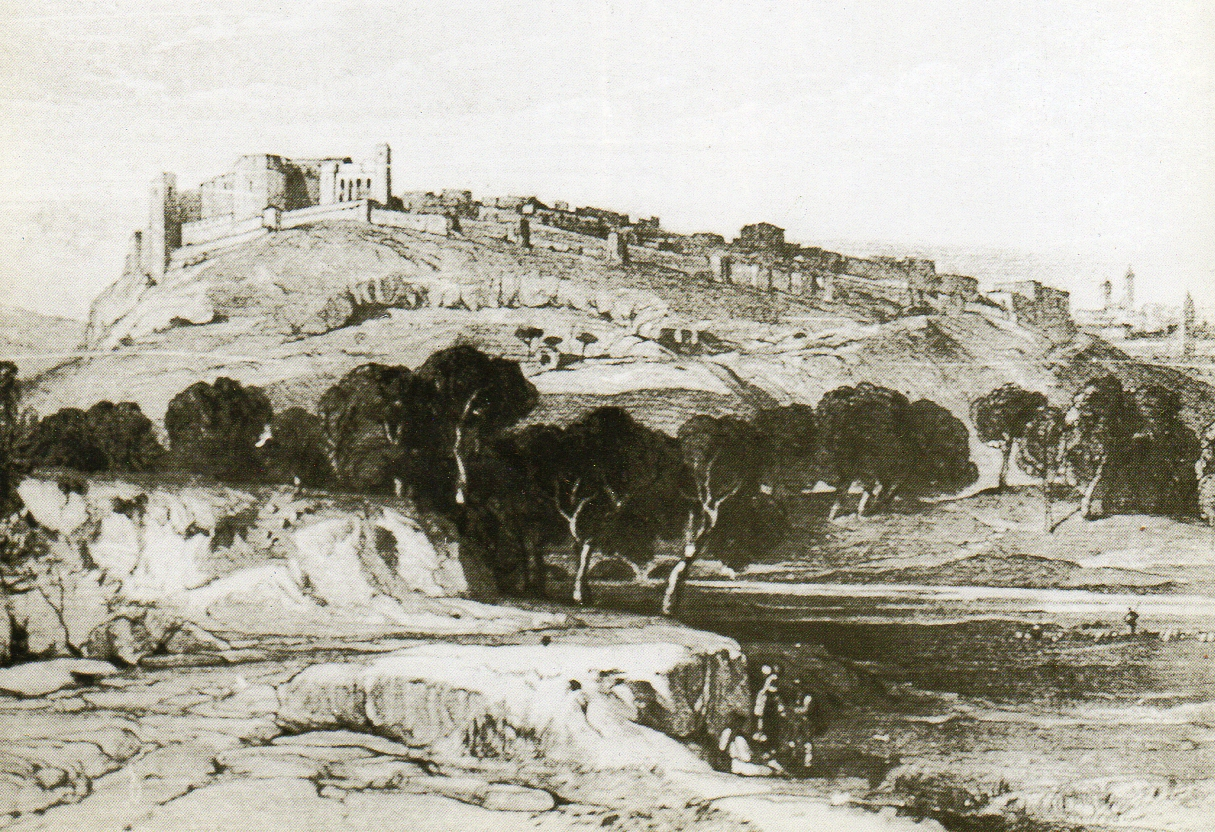 Edward Lear, Disegno di castello e cinta muraria di Melfi, Viaggio in Basilicata (1847)